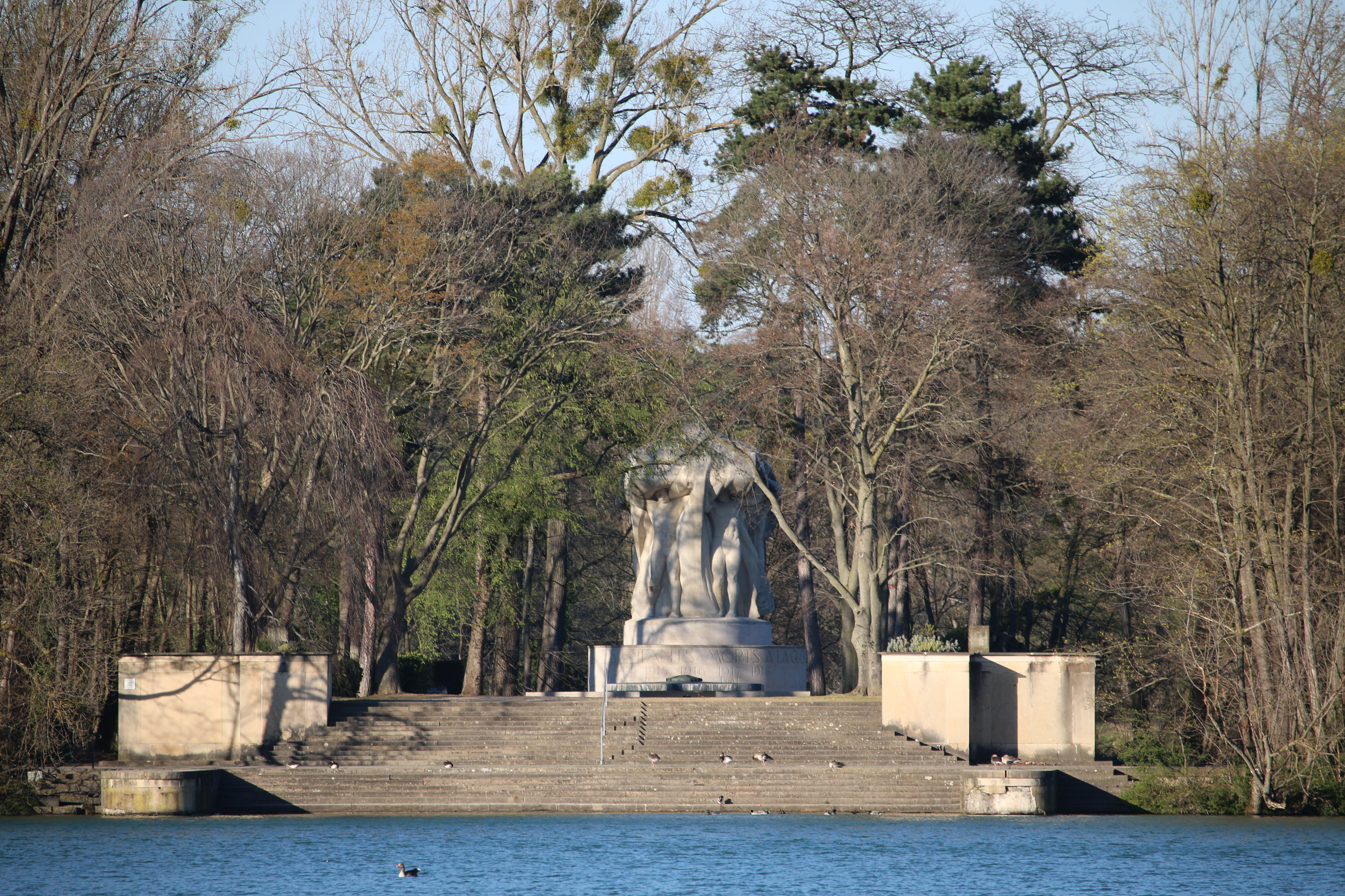 Île du souvenir au Parc de la tête d'or, 6 avril 2015